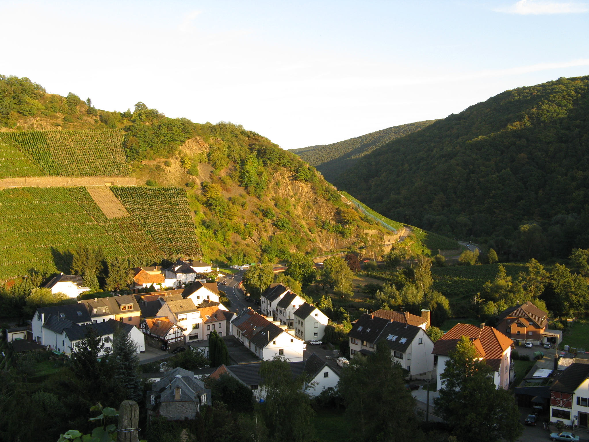 Marienthal with Trotzenberg, Ahr/Germany